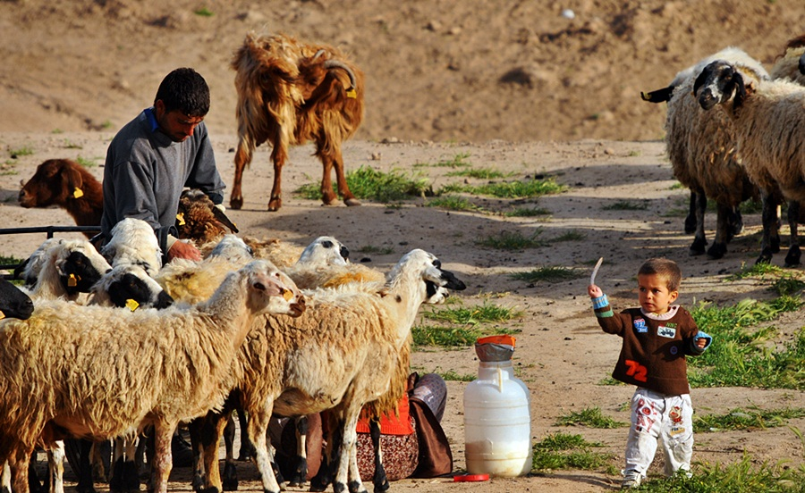 Kurdî: Ji Bismilê